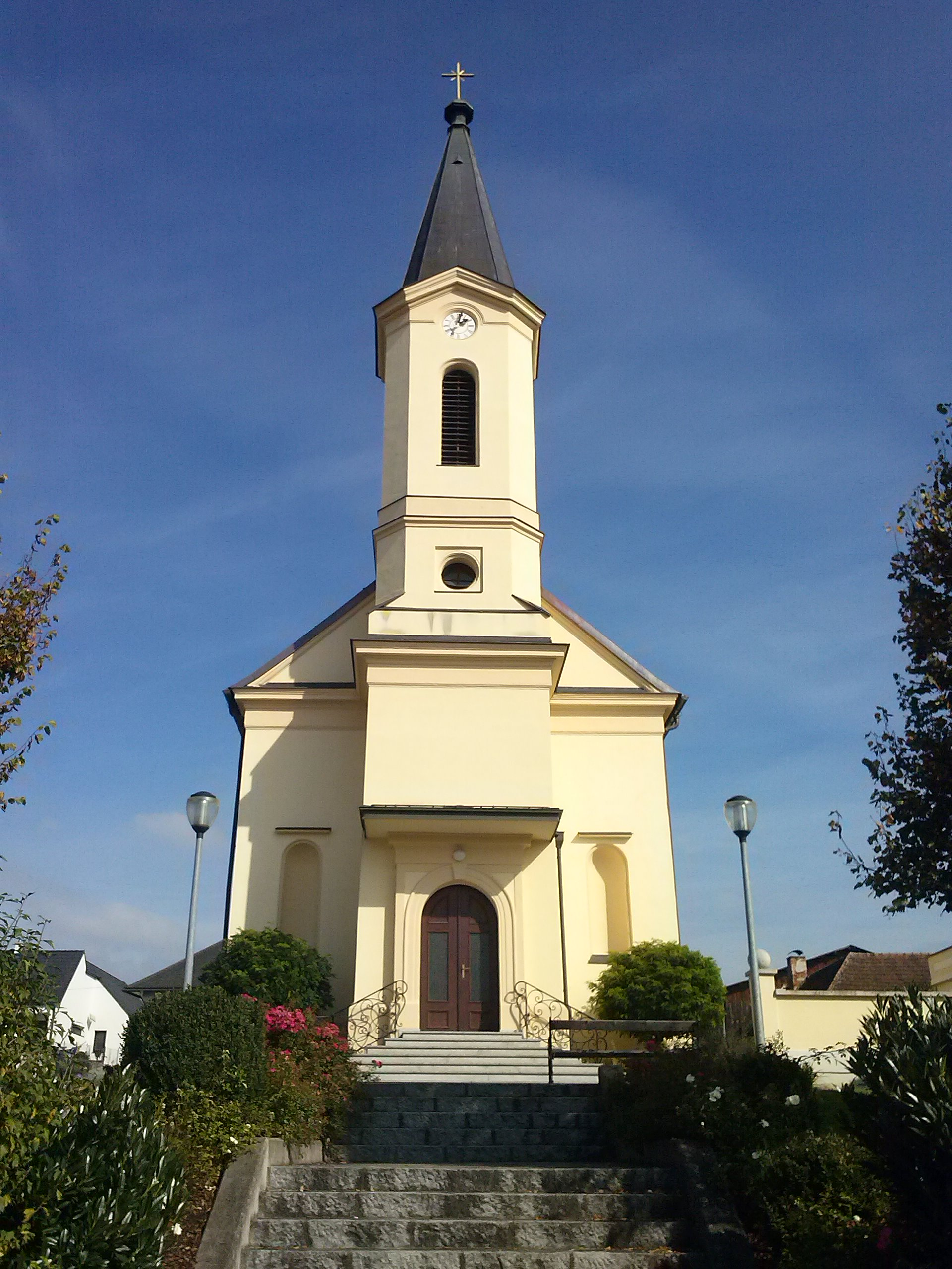 Röm.-Kath. Kirche in Grafenschachen